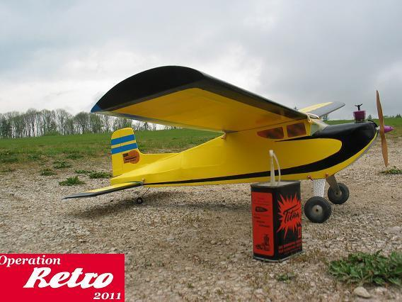 Graupner Cirrus